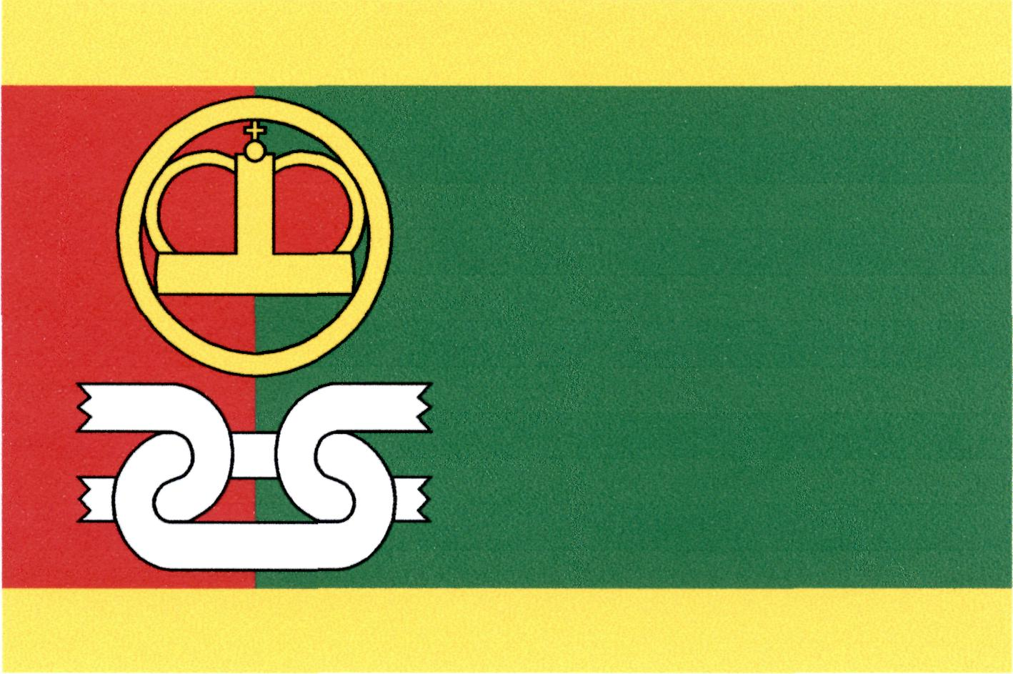 Vlajka obce Hobšovice